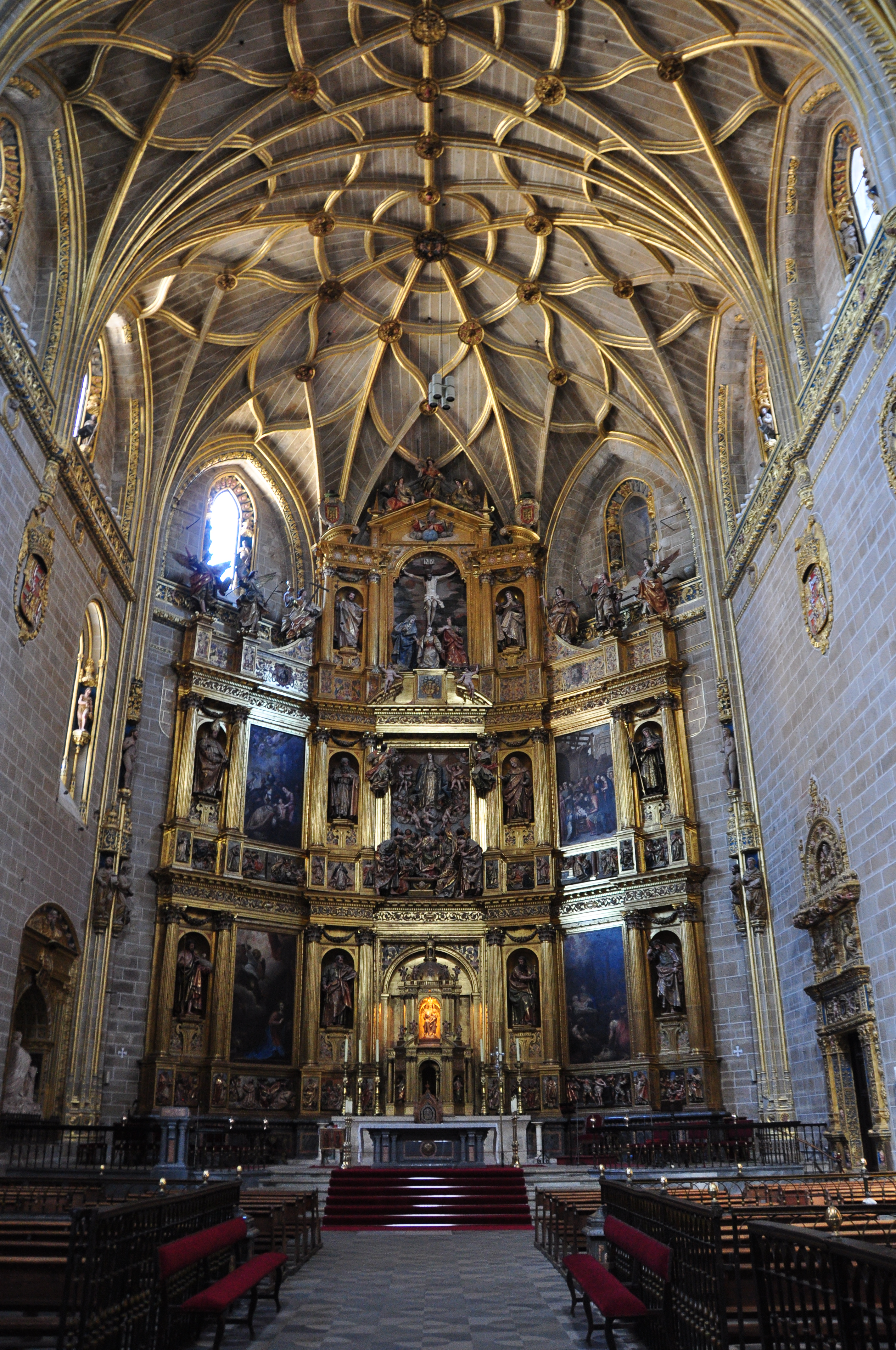 Altar Mayor y bóvedas de la Catedral Nueva de Plasencia.